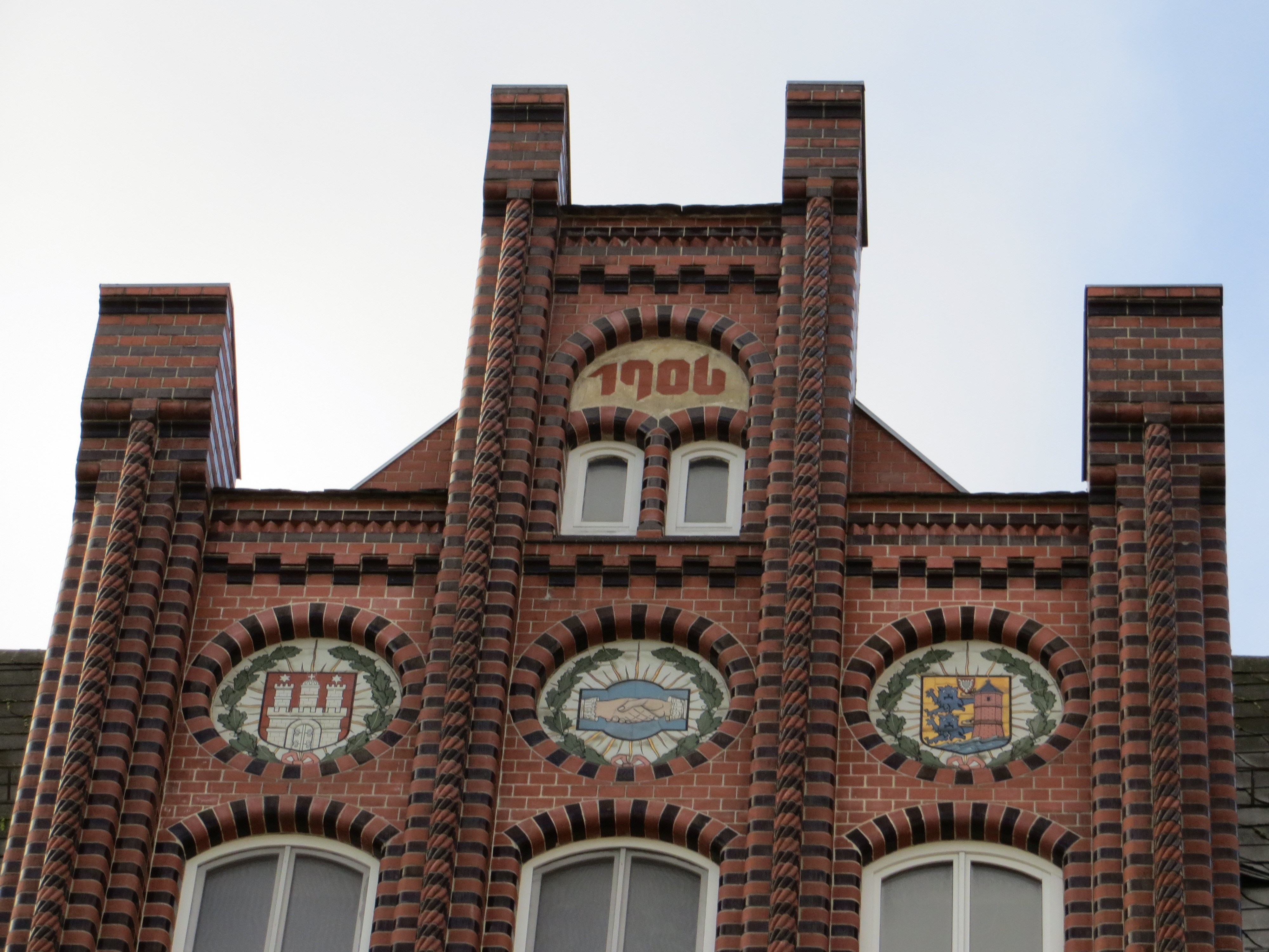 Wappen von Flensburg, Am Gebäude Große Straße 21-23, Flensburg, Bild 02